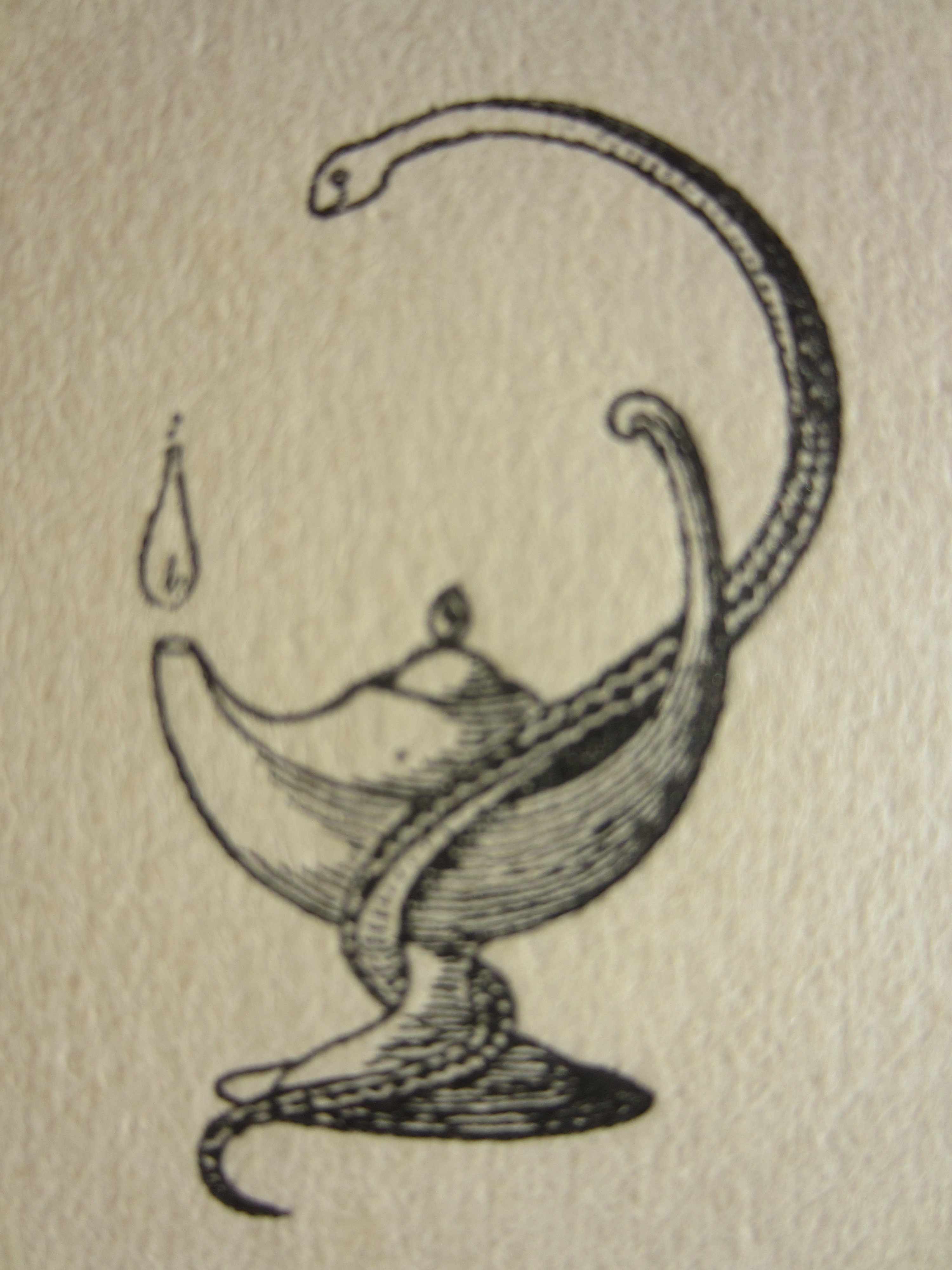 Denna vinjett med ormen och oljelampan skapade Hjalmar Söderberg 1903 och den pryder framsidan av novellsamlingen "Främlingarna" från samma år.